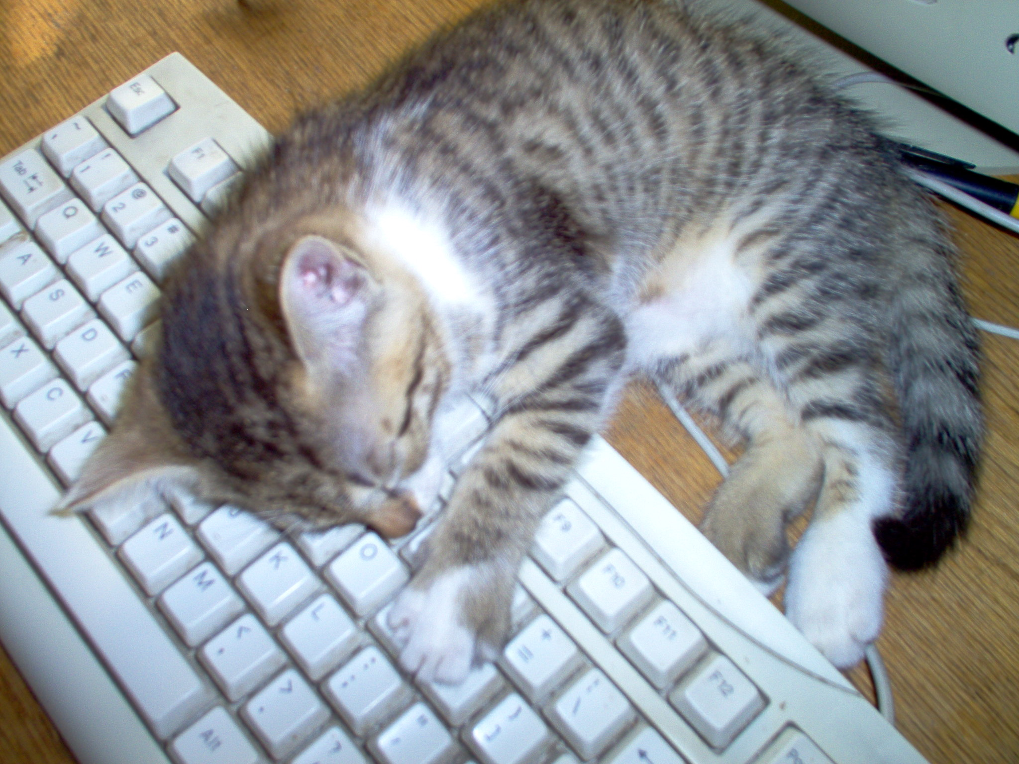 Cat sleeping on keyboard